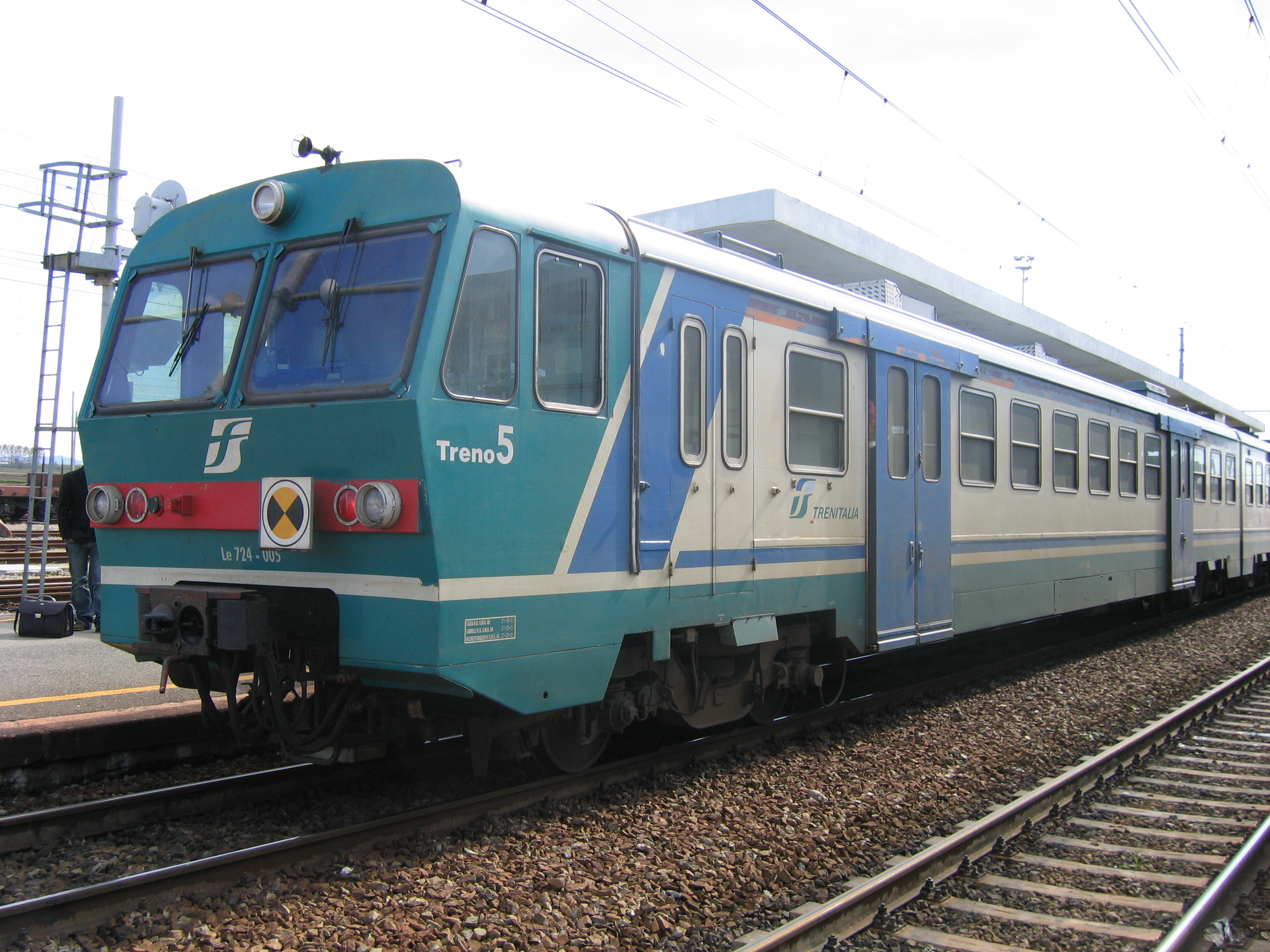 "elettromotrice leggera" ALe724. Santhià (VC), Italy